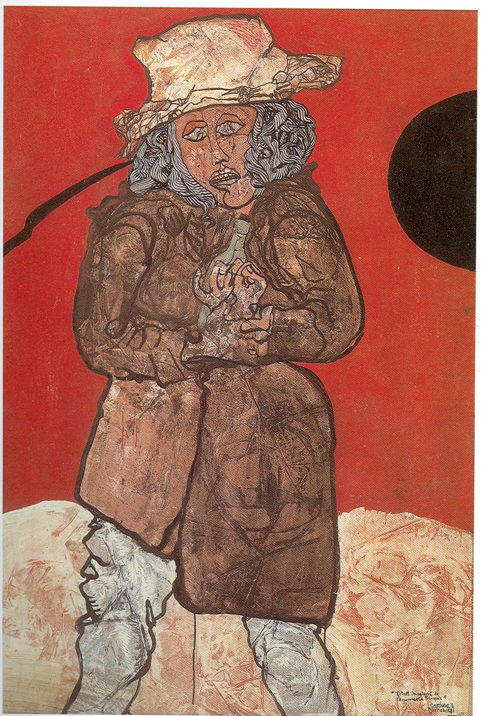 Oli sobre taula 181 x 128 x 3,5 1967 L'Esperanceta Trinquis és un dels personatges de “Ronda de Mort a Sinera”, de Salvador Espriu; per a la qual l'Armand Cardona creà diverses escenografies l'any 1965, 1970 i 1975, totes elles dirigides pel seu amic Ricard Salvat. La Trinquis era una captaire alcoholitzada que vivia en una cova als afores de Sinera i sovint patia la crueltat dels més joves que l'apedregaven. Protagonista de molts fragments espriuans, esdevé paradigma de la trista condició humana. Com Espriu, Cardona també es sentia captivat per aquest personatge que representà en diverses ocasions.